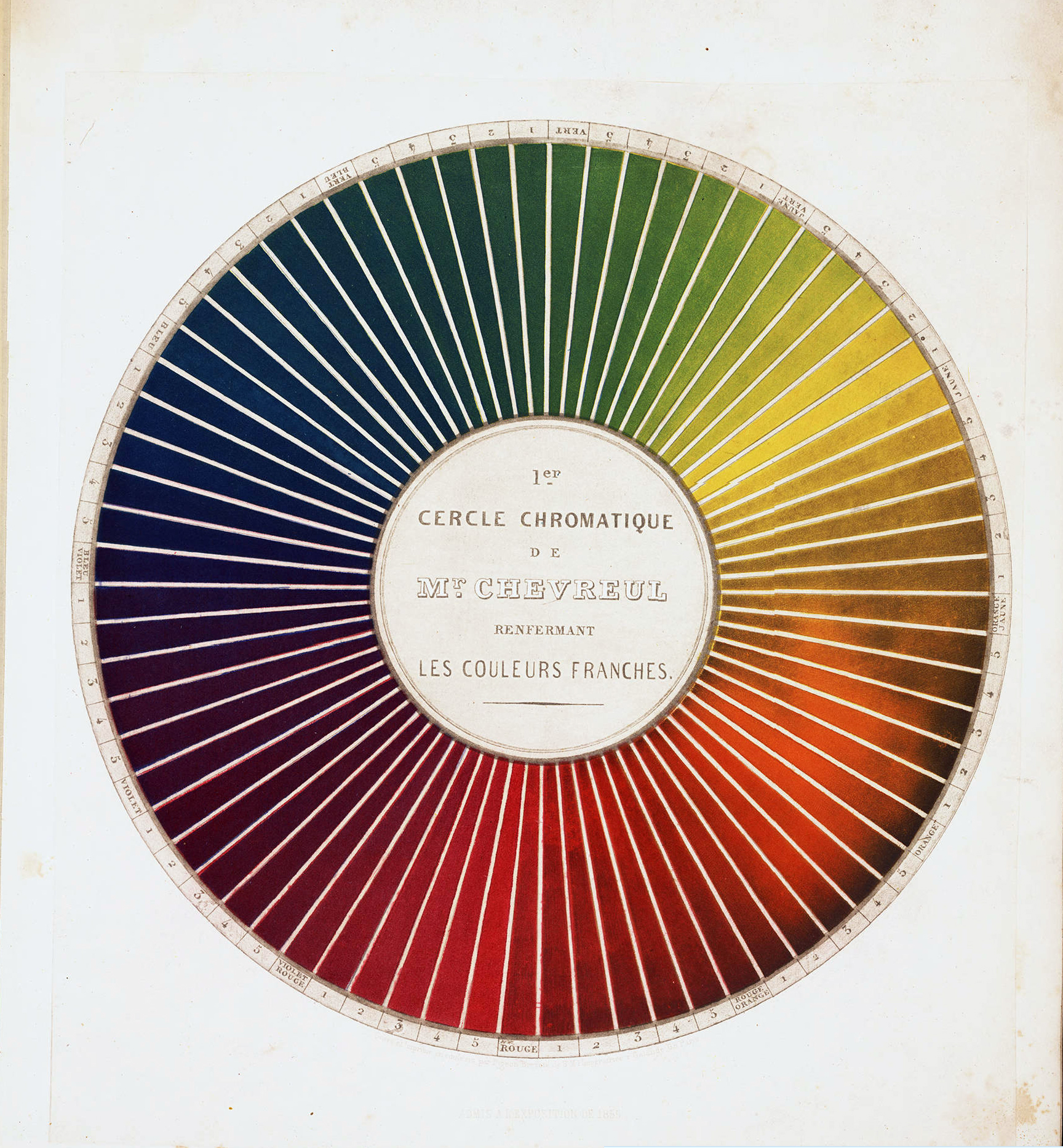 Exposé d’un moyen de définir et de nommer les couleurs, planche 3.